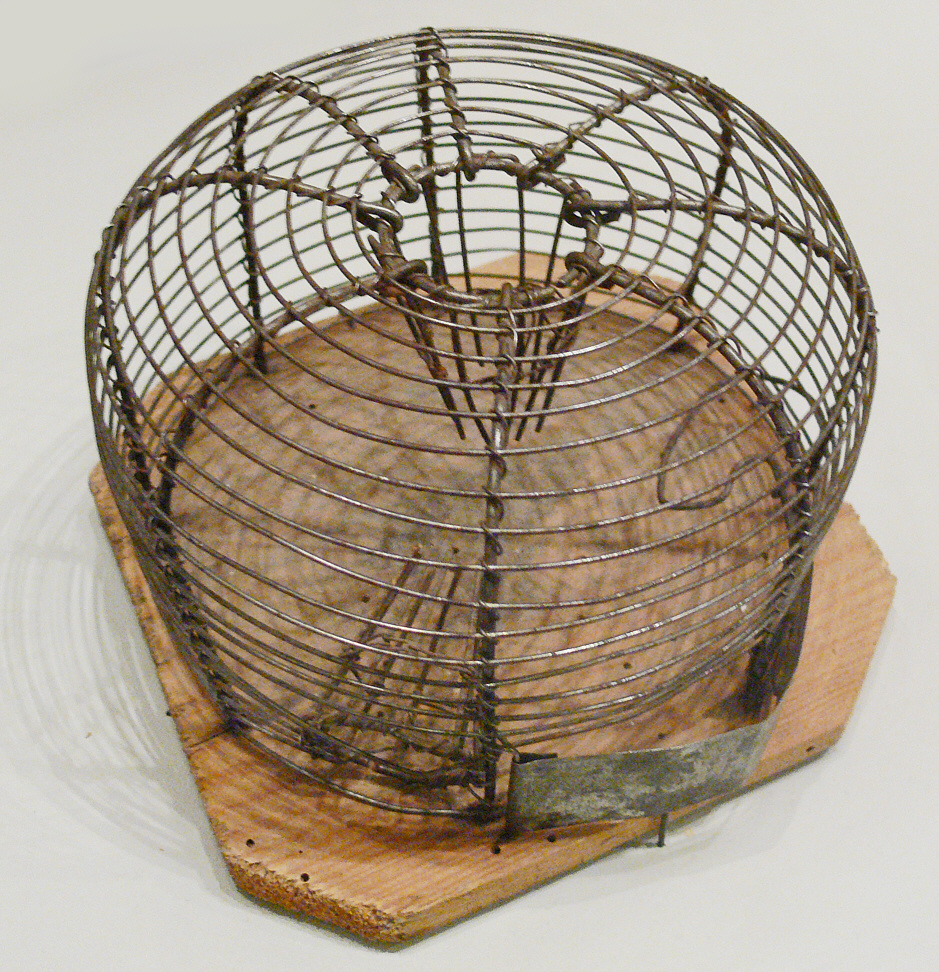 Mausefalle aus Fichtenholz und Eisendraht, 1. Hälfte 19. Jahrhundert Landesmuseum Württemberg (Außenstelle Museum für Volkskultur in Württemberg, Waldenbuch)